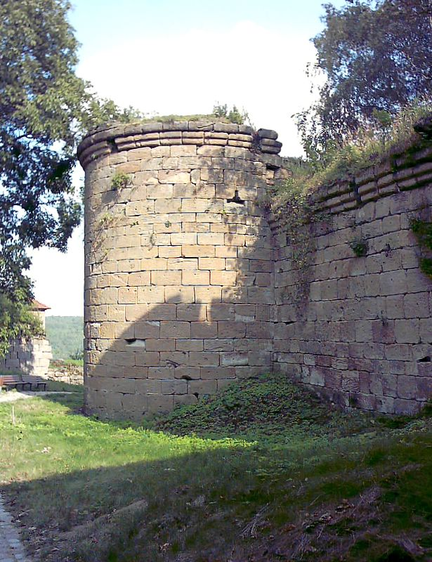 Burg Altenstein bei Ebern (Haßberge, Unterfranken). Der Nordostturm (um 1420/30). Eigene Aufnahme, Aug. 2006 / Altenstein castle near Ebern (Lower Franconia, Germany). The northeastern tower (ca. 1420/30). Own photo, Aug. 2006